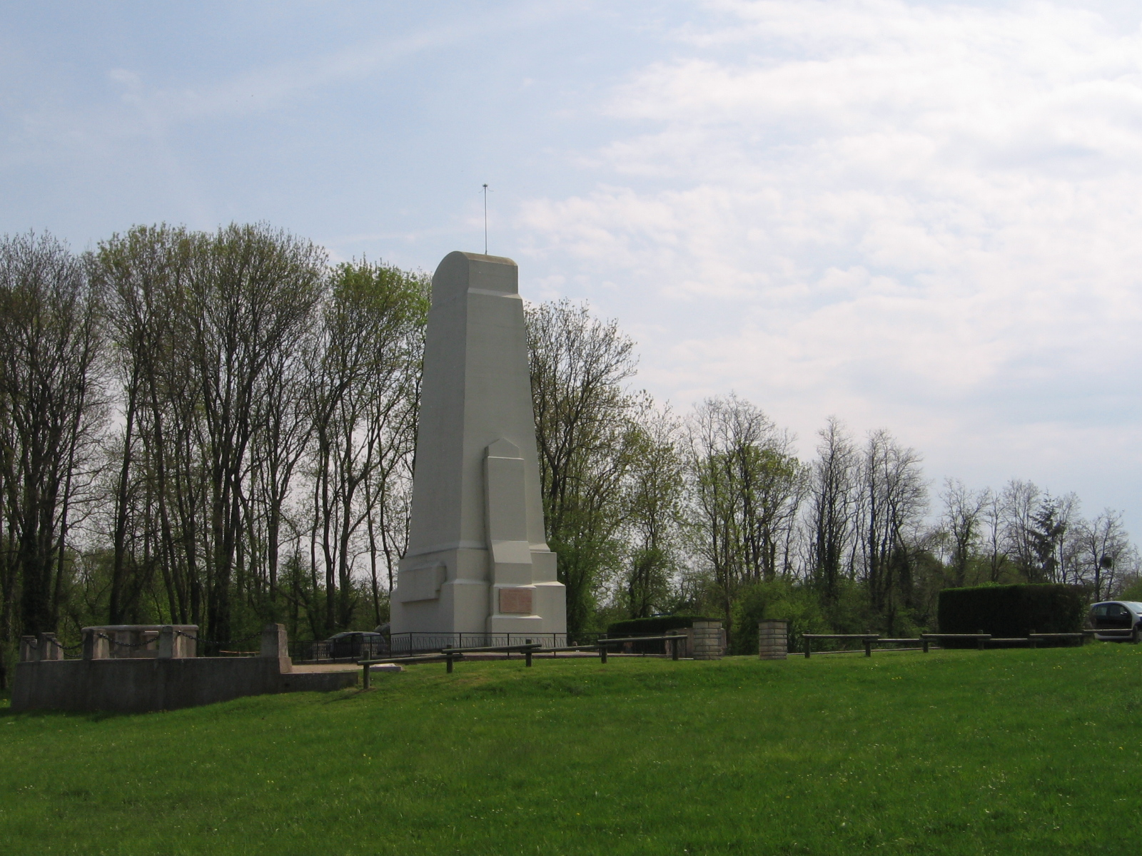 Monument de Lorraine, may 2006